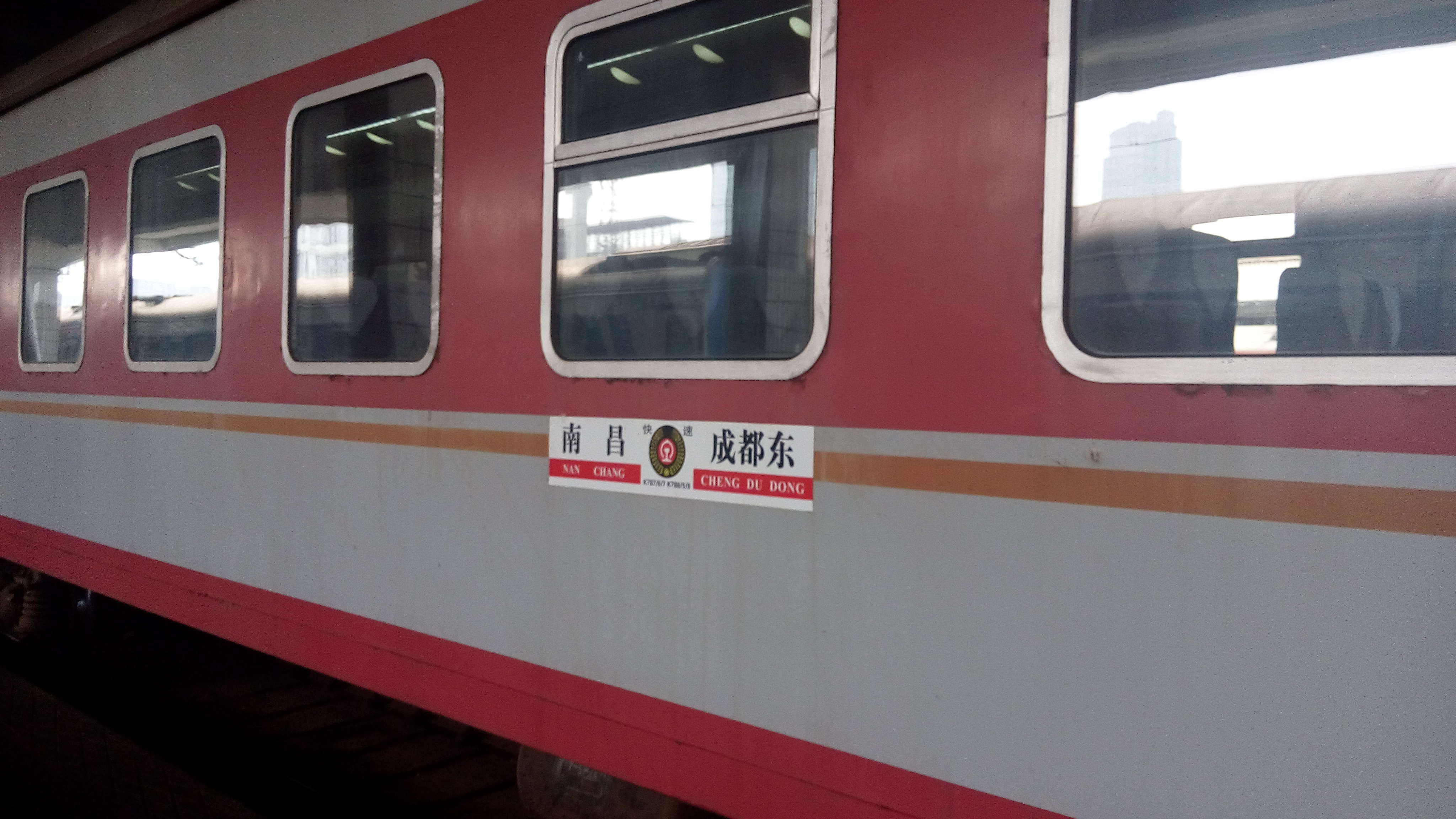 K787/K788列车 停靠在4站台8道